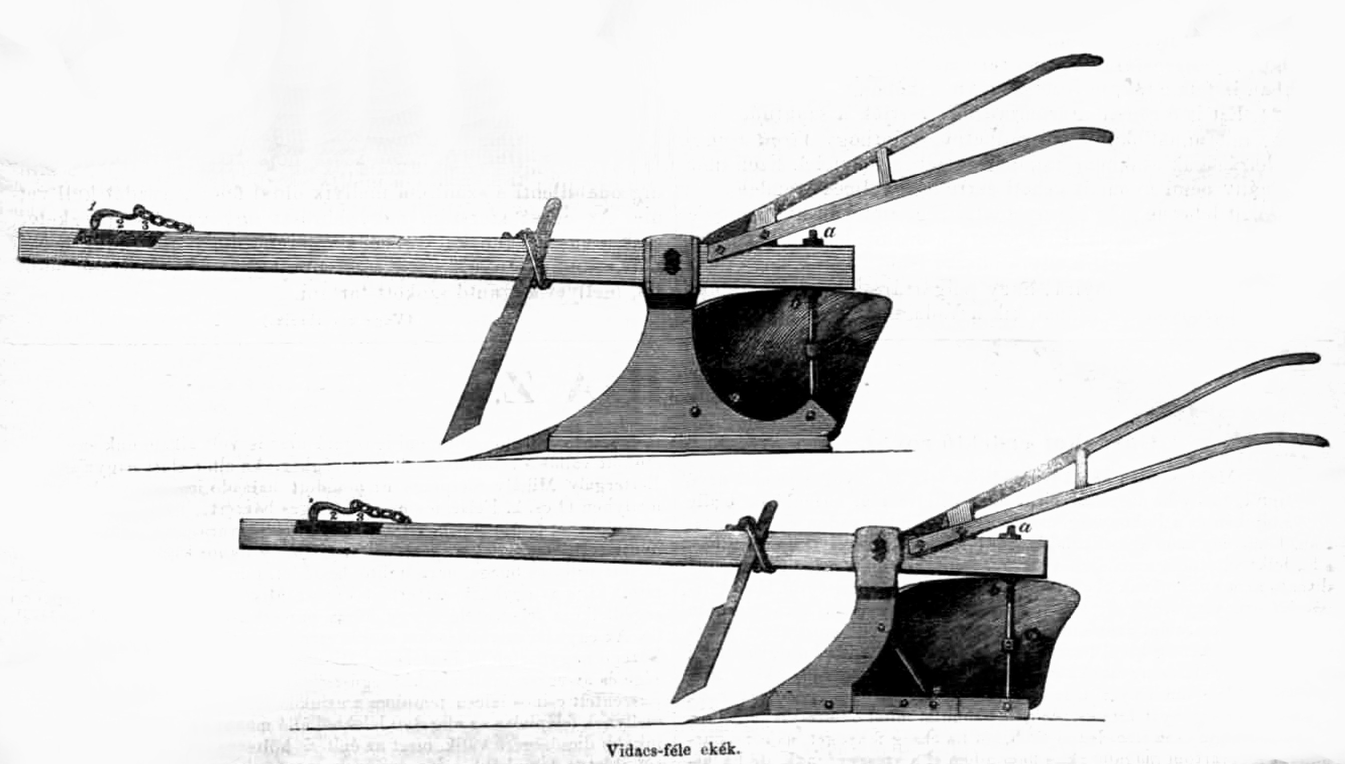 Vidács-féle ekék Vasárnapi Ujság illusztrációja